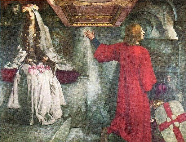 Edwin Austin Abbey